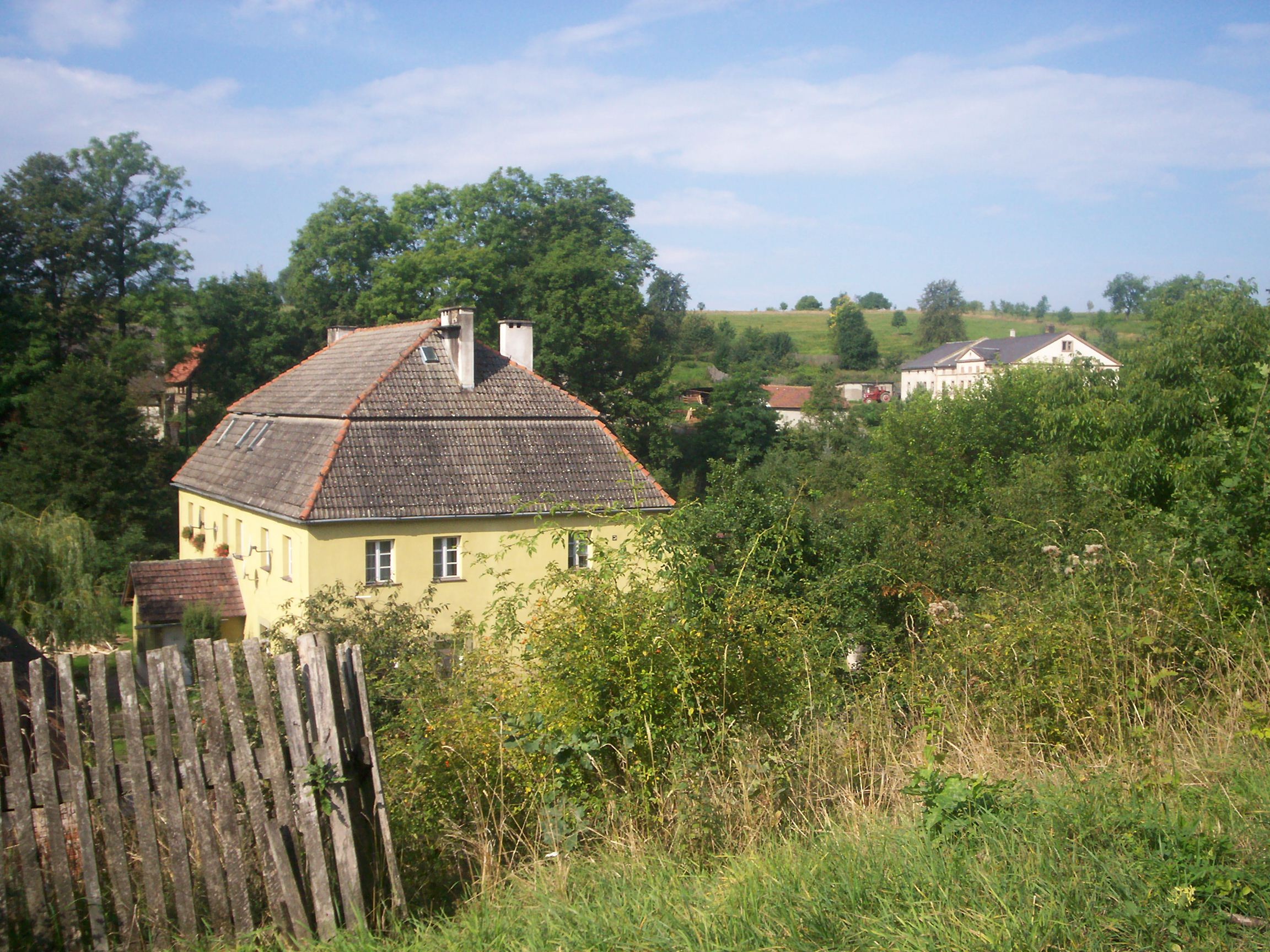 Płóczki Górne, wieś w gminie Lwówek Śląski.